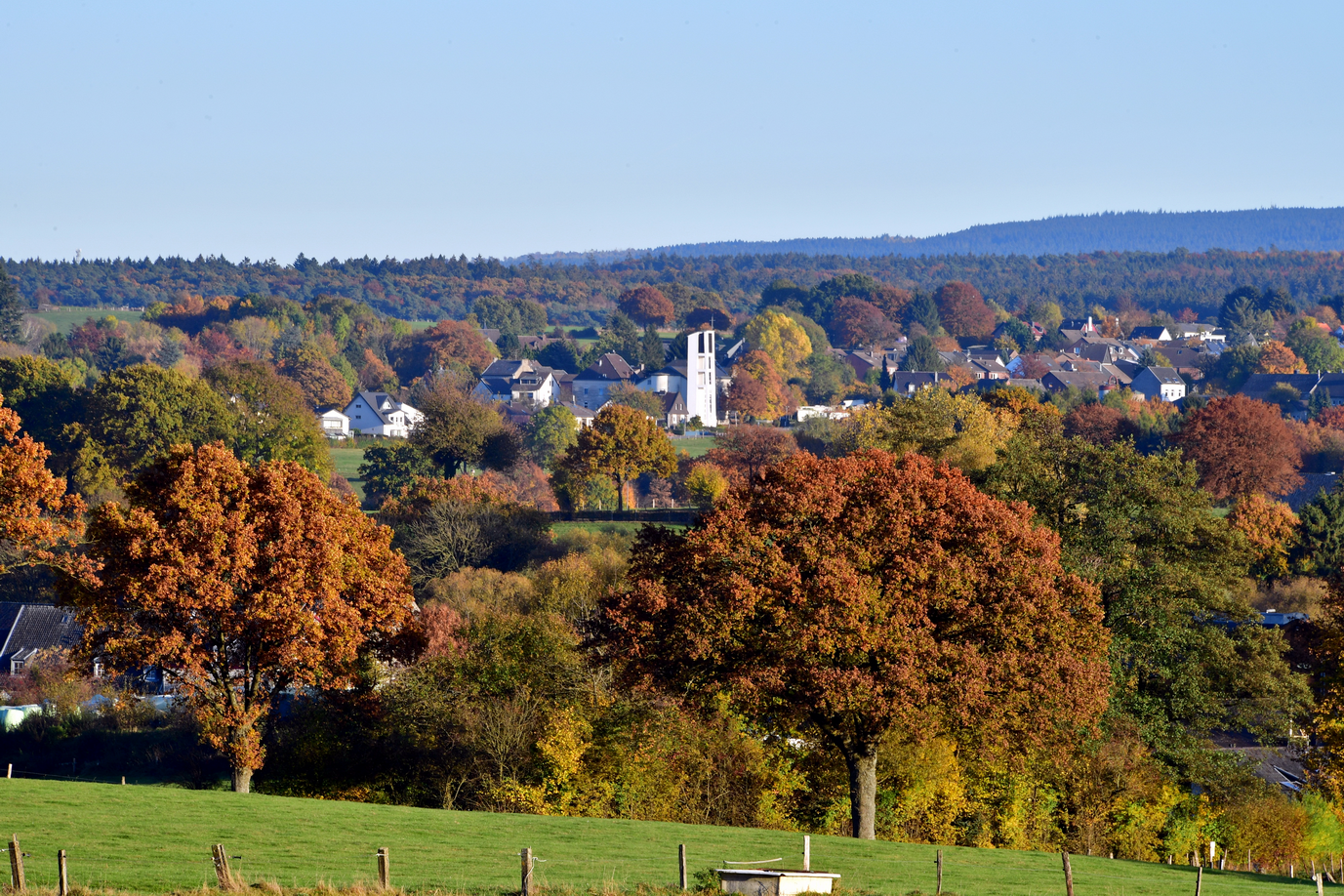 Schmithof, Aachen Kornelimünster/Walheim